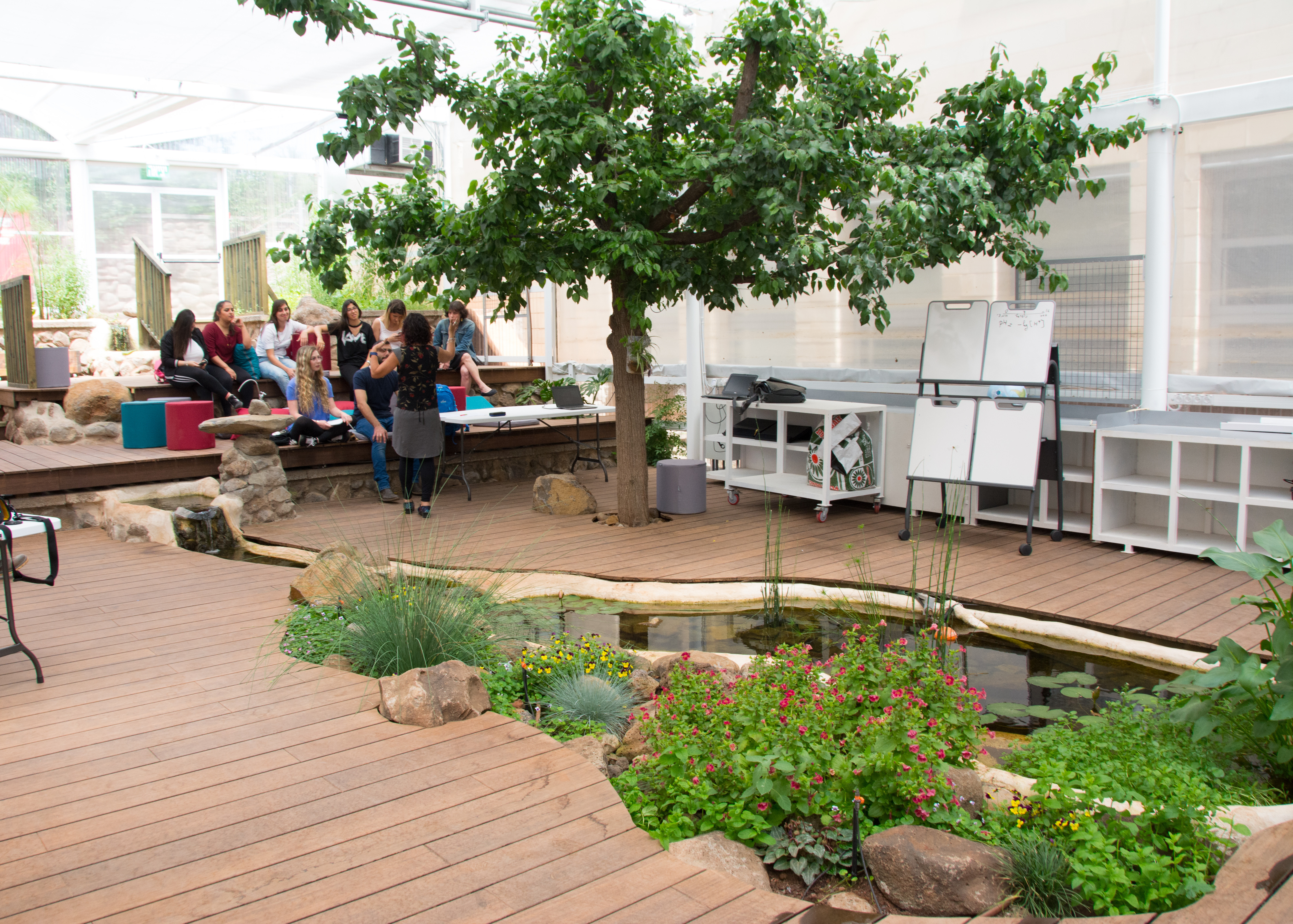 Ohalo Biophilic Learning Space